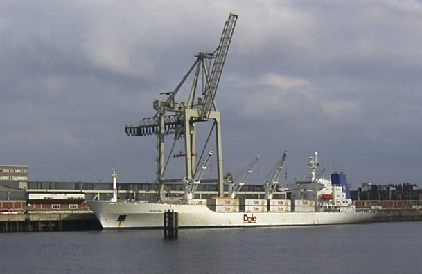 Bananenfrachter "Tropical Mist" der Firma Dole am O'Swaldkai in Kleiner Grasbrook